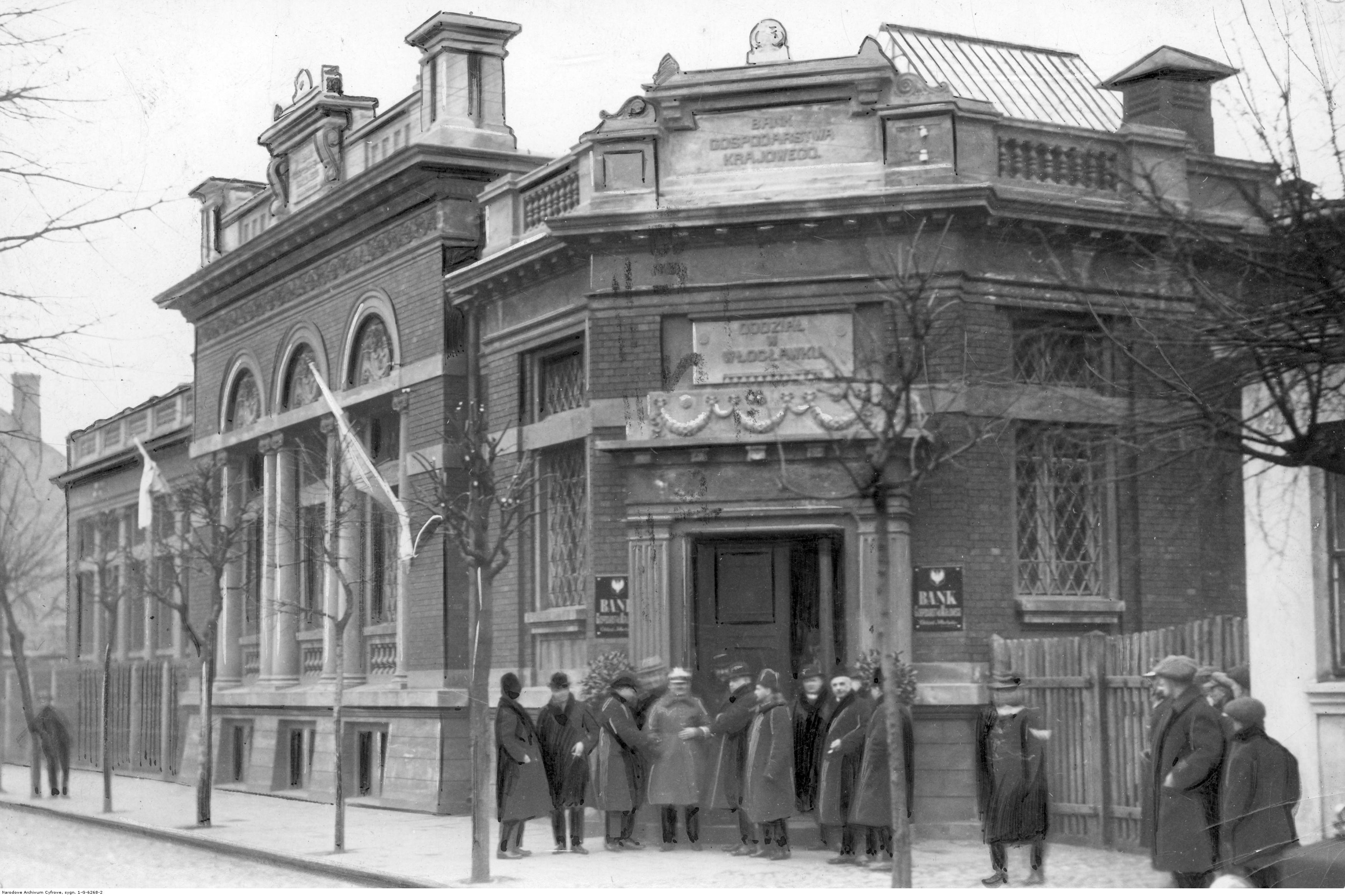 Otwarcie oddziału Banku Gospodarstwa Krajowego we Włocławku. Uczestnicy uroczystości przed budynkiem banku. 1928 r.